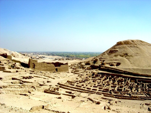 Eigen fotobewerking Deir el Medinah januari 2007 Ben Pirard